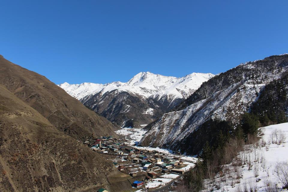 Шаитли, Цунтинский район. Конец зимы 2016 года. Вид на Богосский хребет.